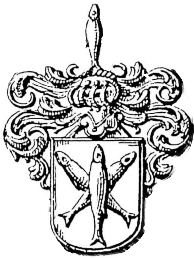 Afdruk van een zegel van het wapen Quispel vh. Santvoort